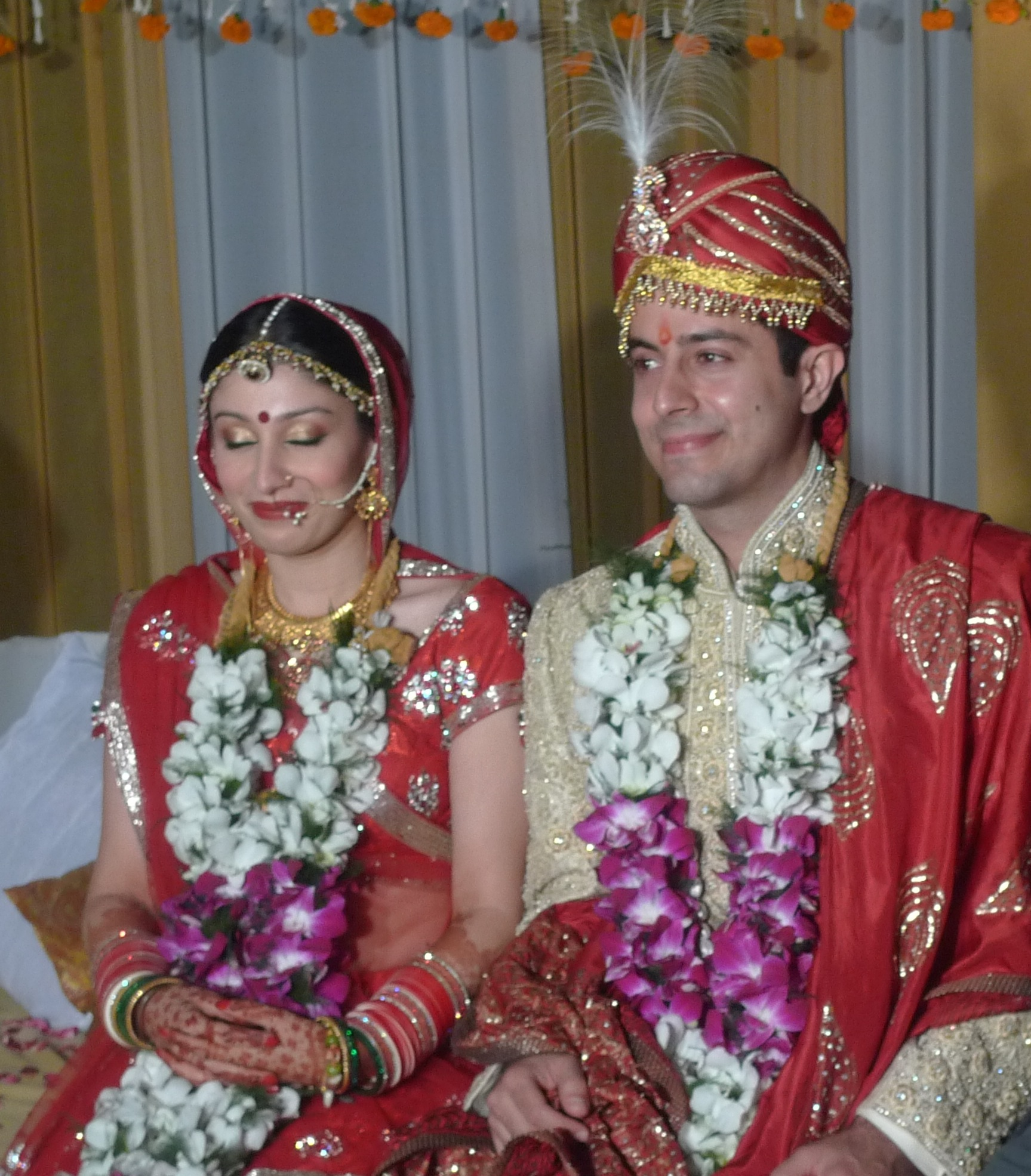 India wedding